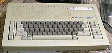 Dragon MSX en mi cocina